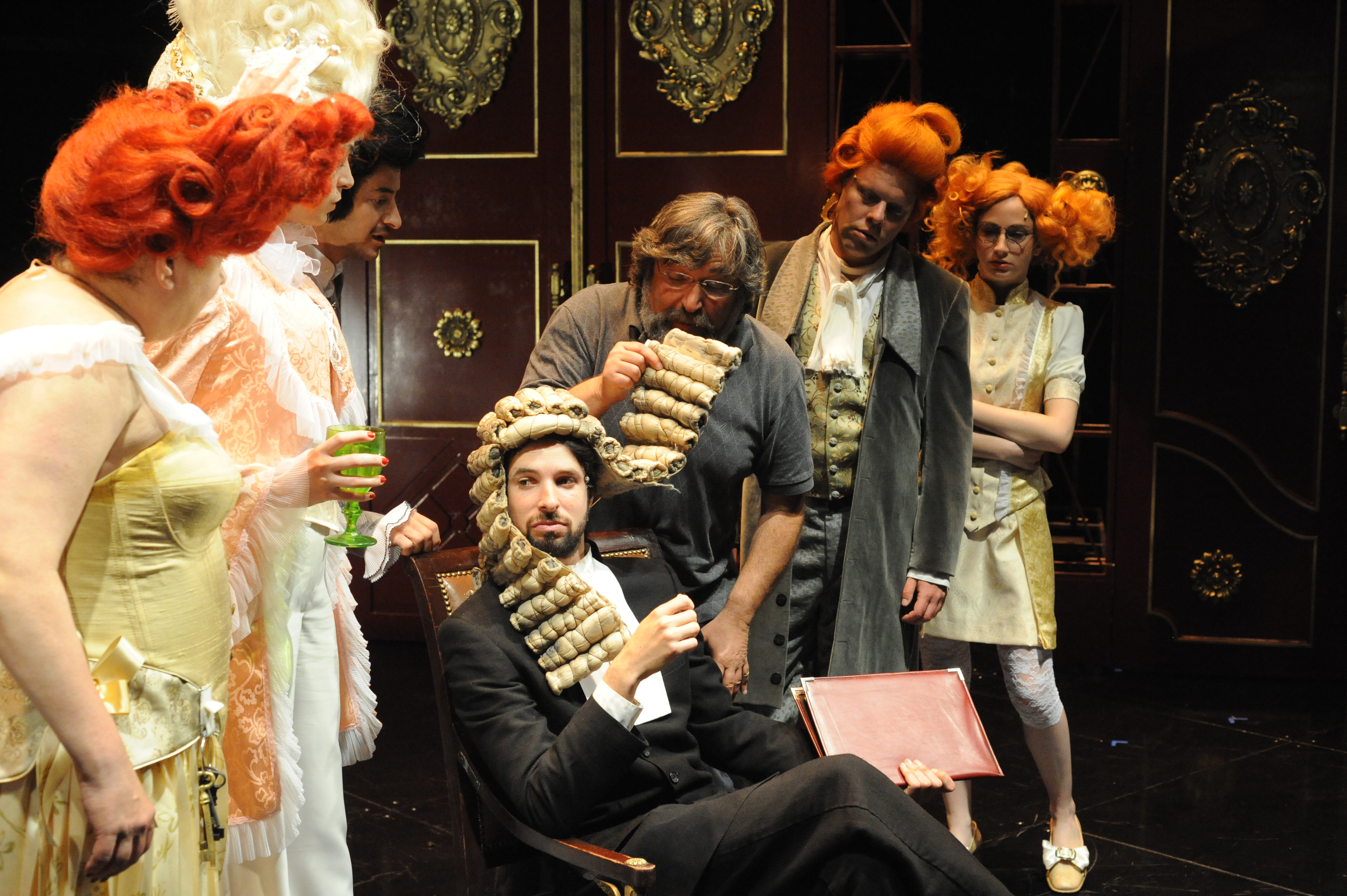 יבגני אריה חזרות טרטיף 2009